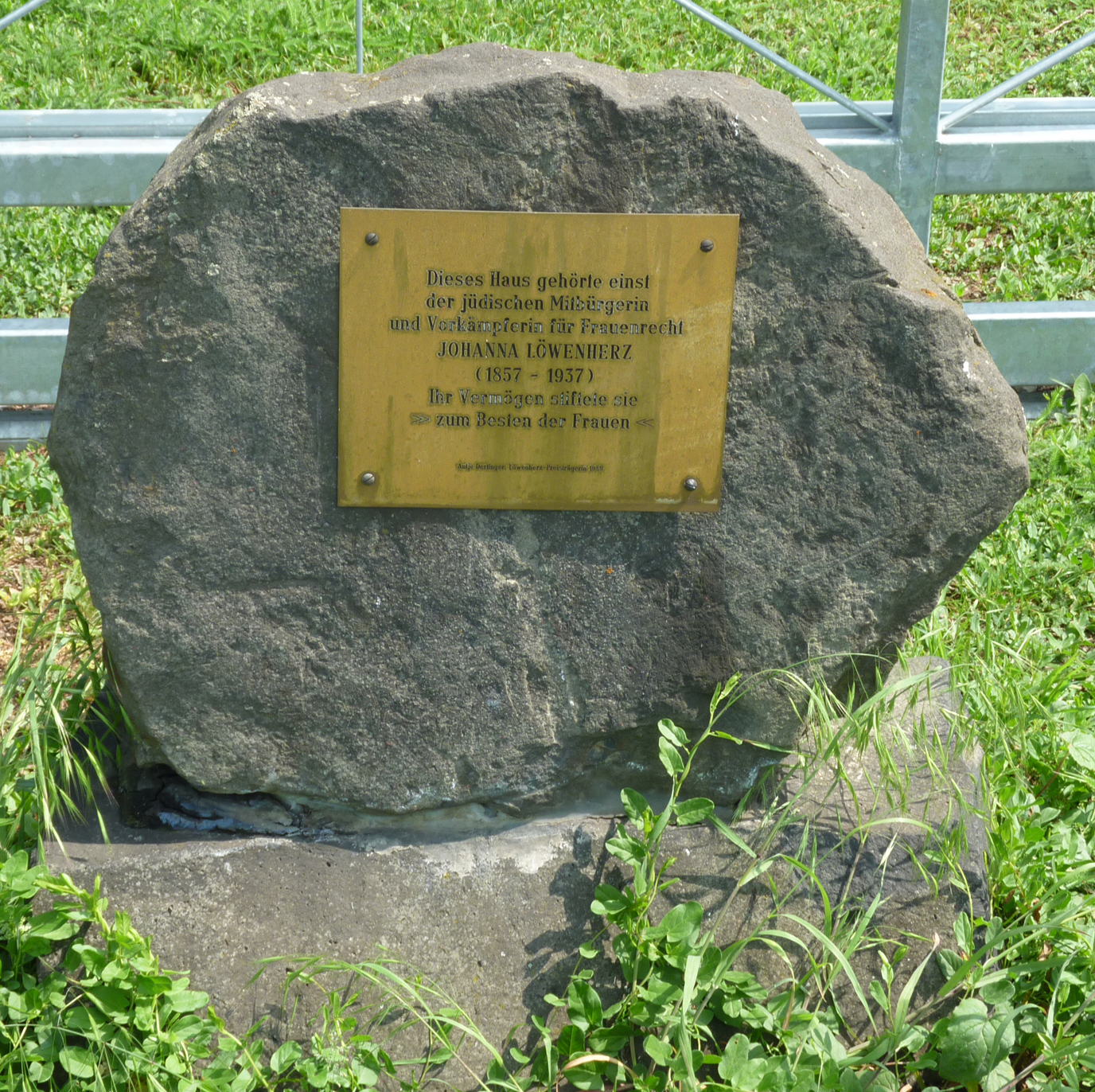 Gedenktafel am Löwenherz-Haus